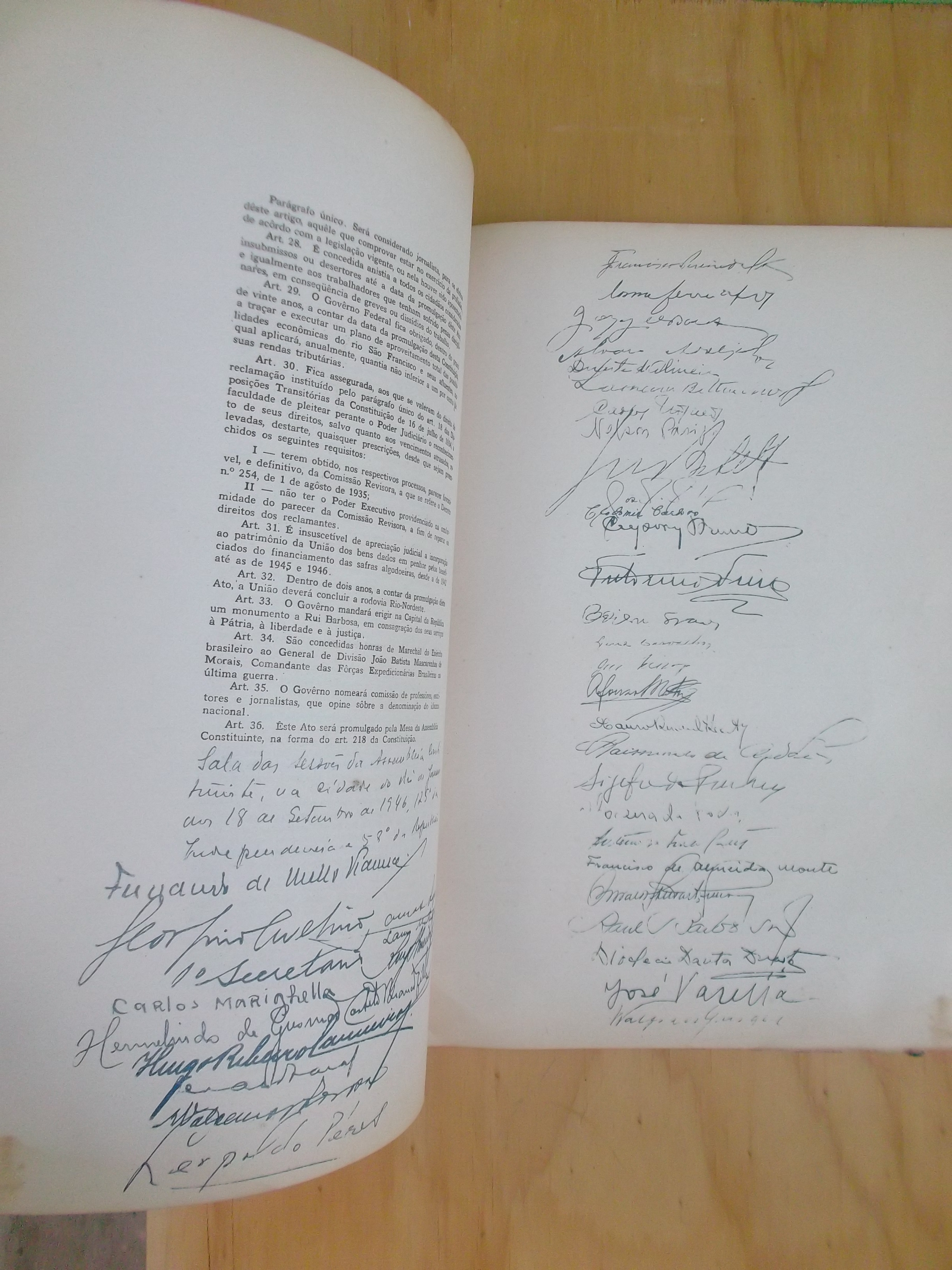 Assinaturas dos constituintes no Ato das Disposições Constitucionais Transitórias da Constituição do Brasil de 1946(Constituição da República dos Estados Unidos do Brasil).